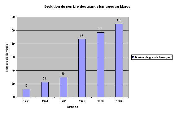 Graphique montrant l'évolution du nombre de barrages au Maroc